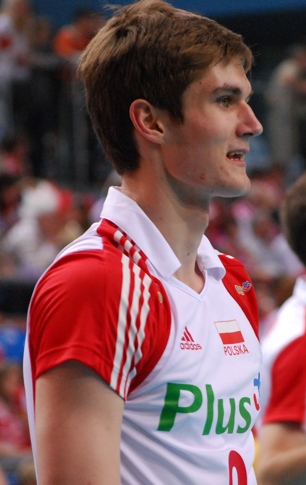 Karol Kłos